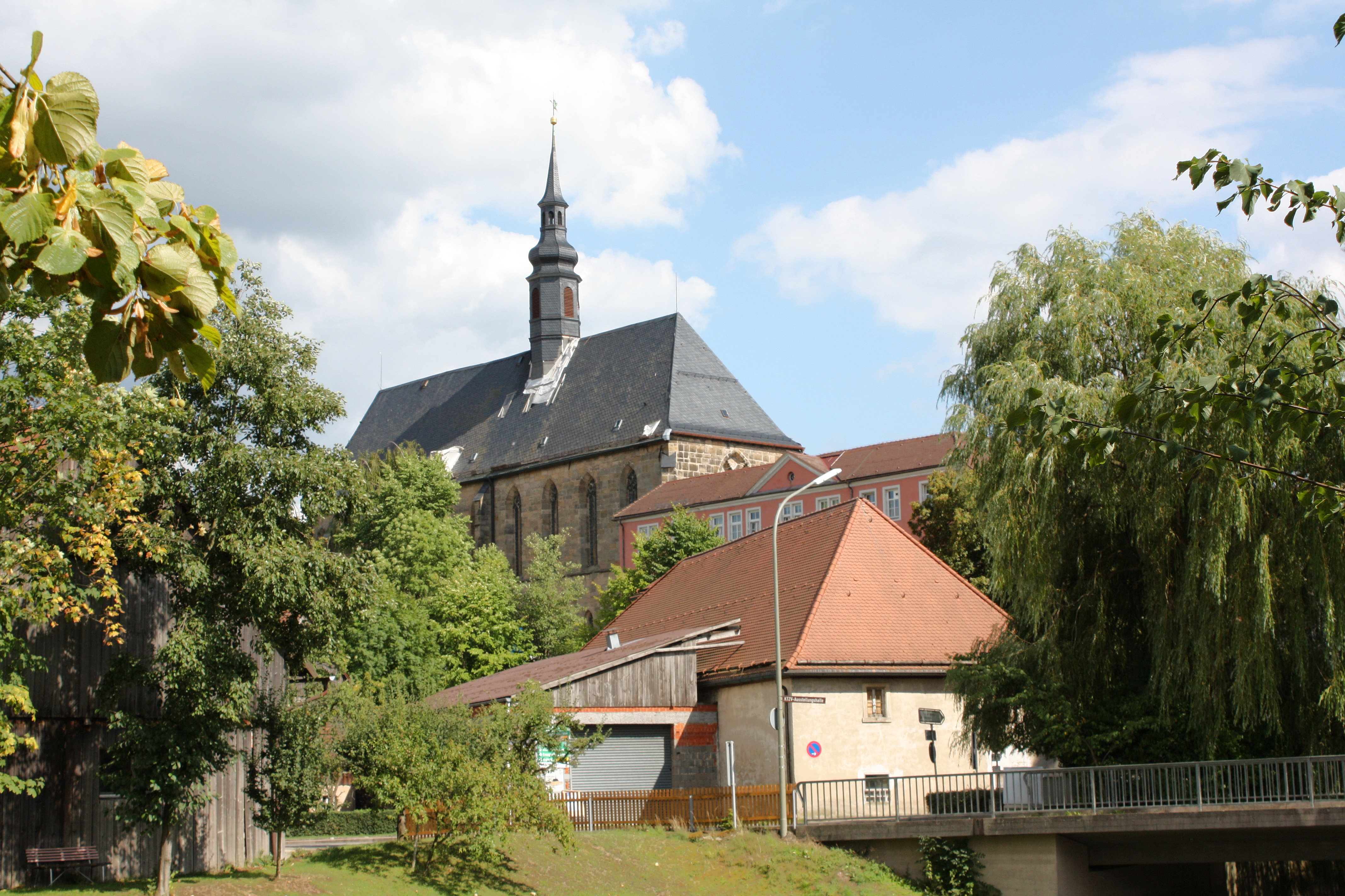 Himmelkron, Blick auf das Klostergebäude